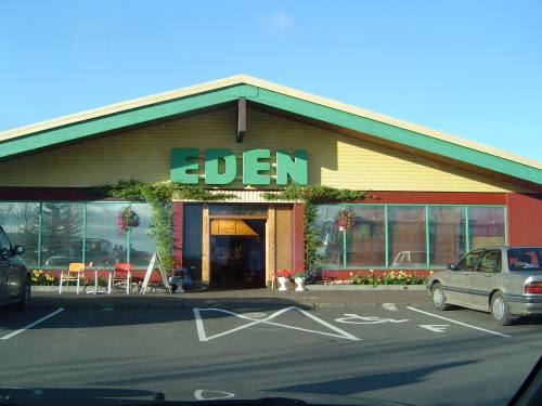 Eden veitingastaður í is:Hveragerð